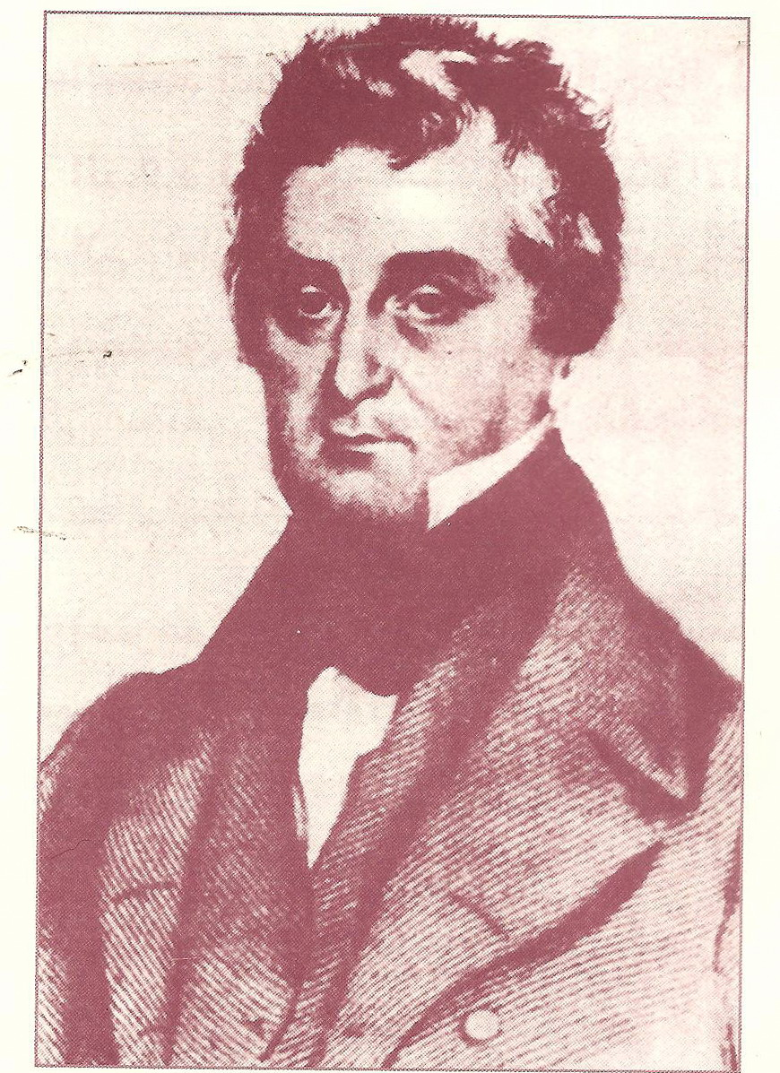 الكابتن ج.بيرنت تومسون أحد ضباط الحملة البريطانيةو مترجم الحملة و كاتباتفاقية 1820 باللغة